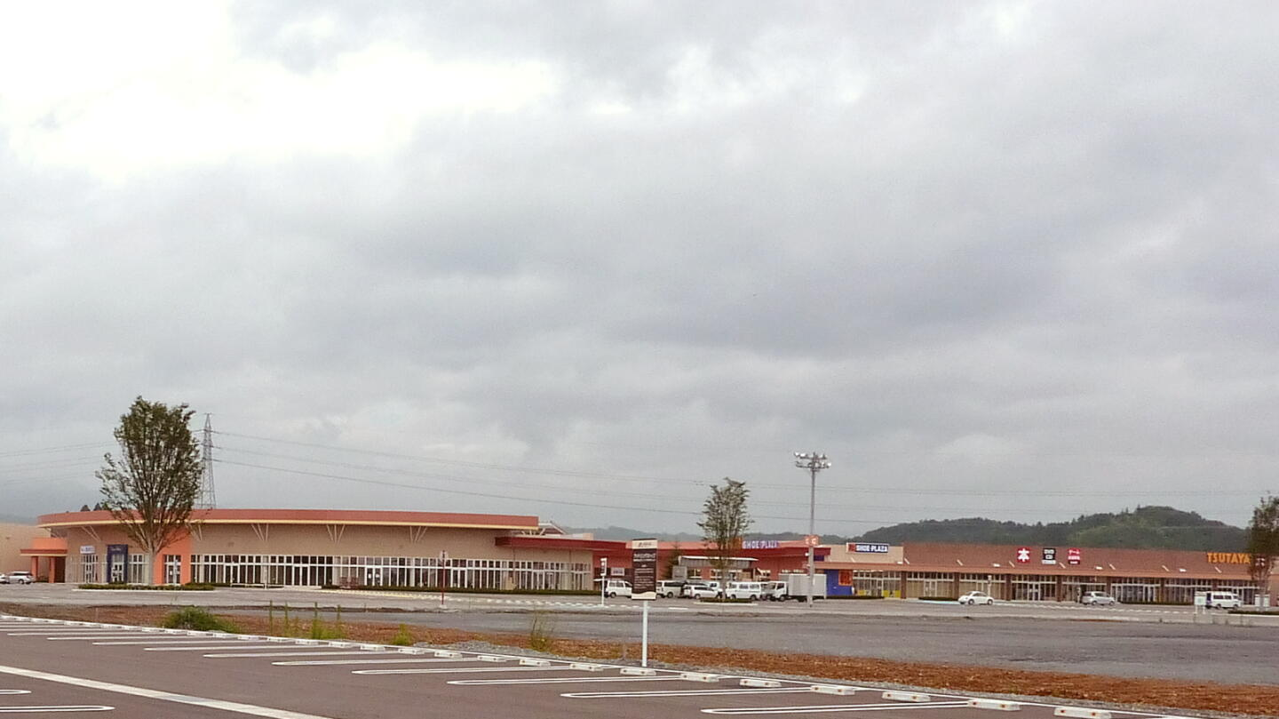 南相馬ジャスモール（専門店街）